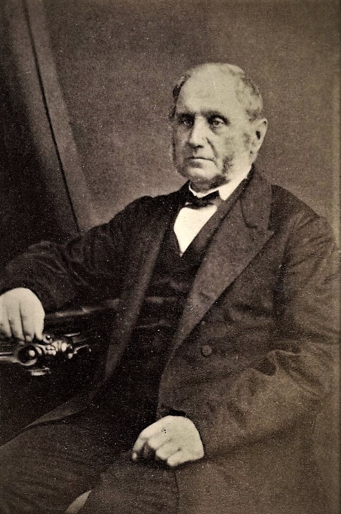 Pierre Beaubien, M.D.